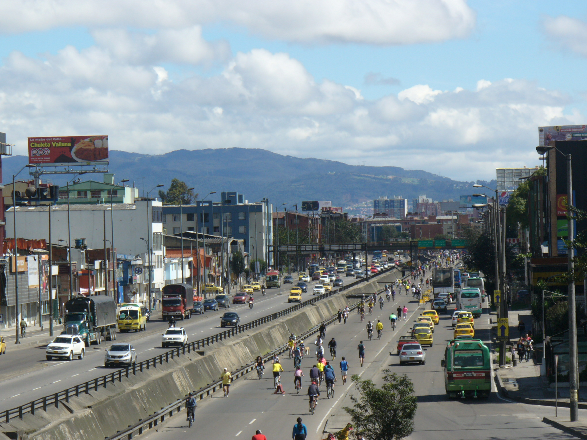 Avenida Boyacá entre calles 48 y 53